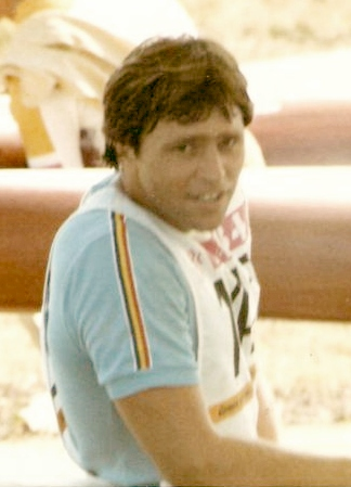 Toma Simionov